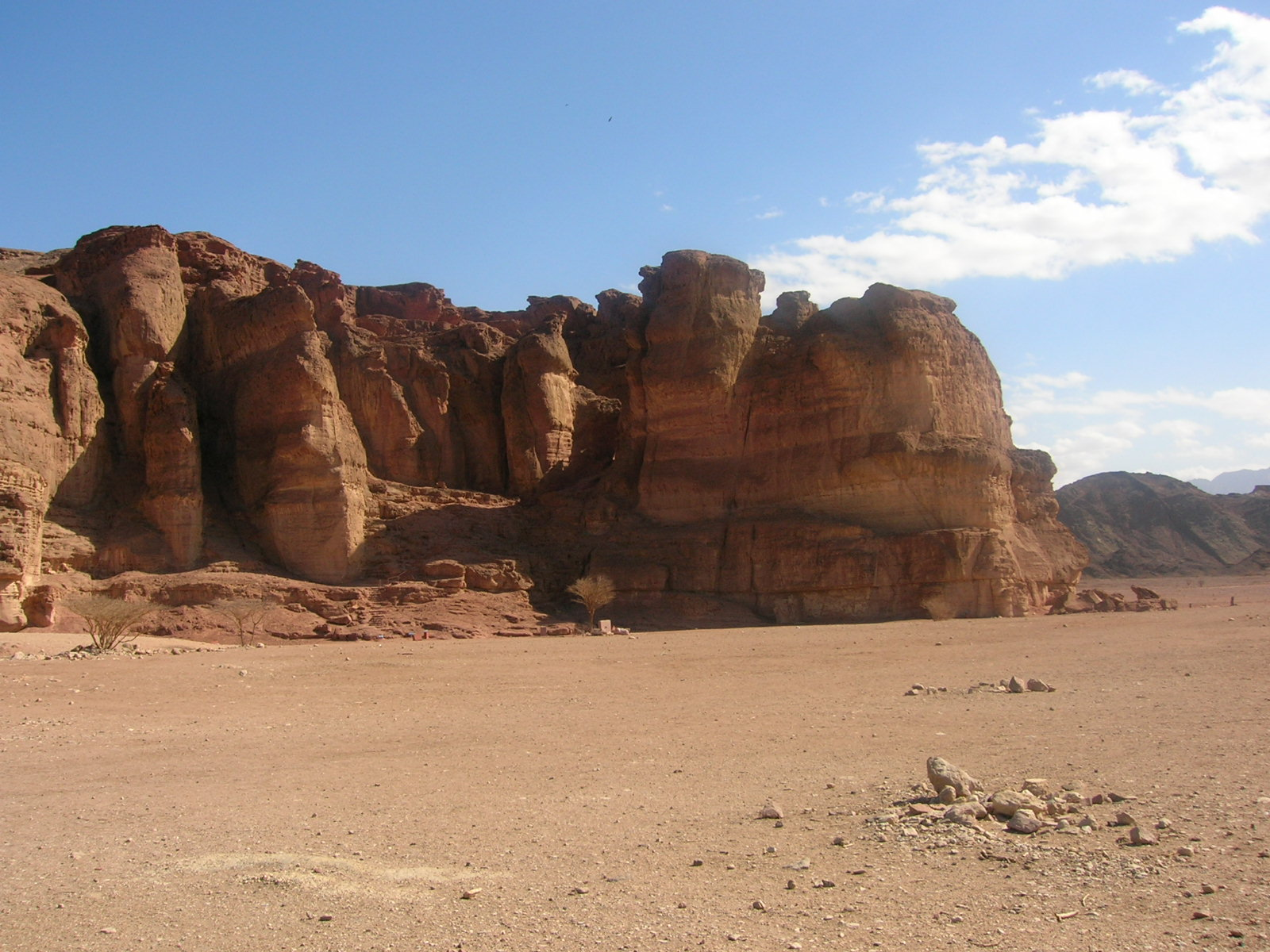 Timna Park, Negev, Israel